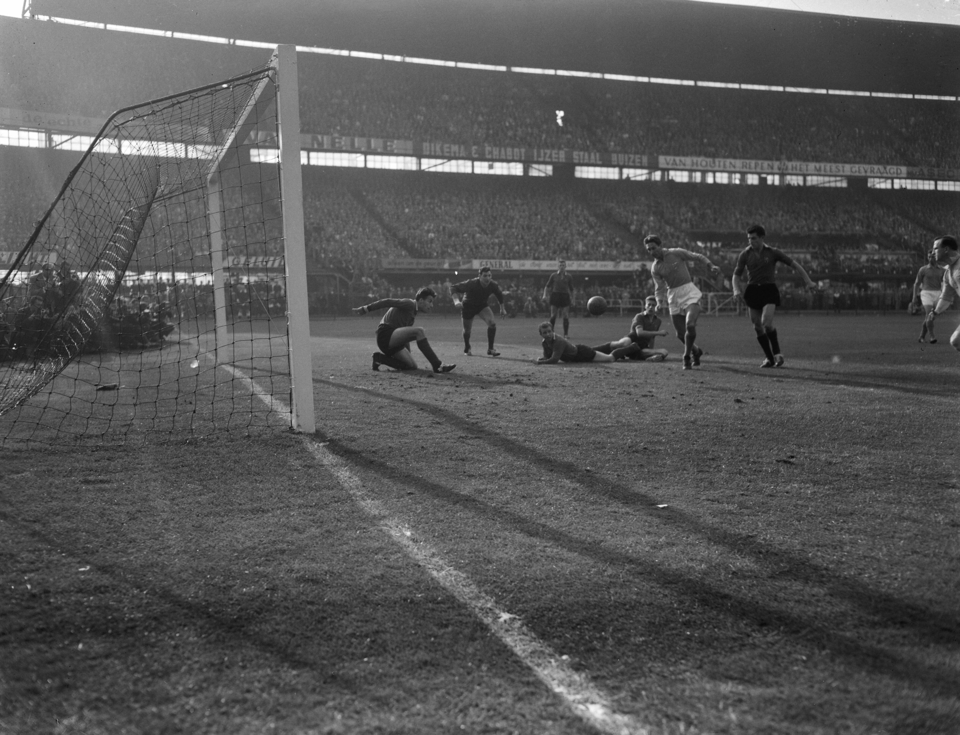 Collectie / Archief : Fotocollectie Anefo Reportage / Serie : [ onbekend ] Beschrijving : Nederland tegen Belgie 9-1, Faas Wilkes scoort 6-0 Datum : 4 oktober 1959 Locatie : Rotterdam, Zuid-Holland Trefwoorden : sport, voetbal Persoonsnaam : Wilkes, Faas Fotograaf : Behrens, Herbert / Anefo Auteursrechthebbende : Nationaal Archief Materiaalsoort : Negatief (zwart/wit) Nummer archiefinventaris : bekijk toegang 2.24.01.04 Bestanddeelnummer : 910-7231